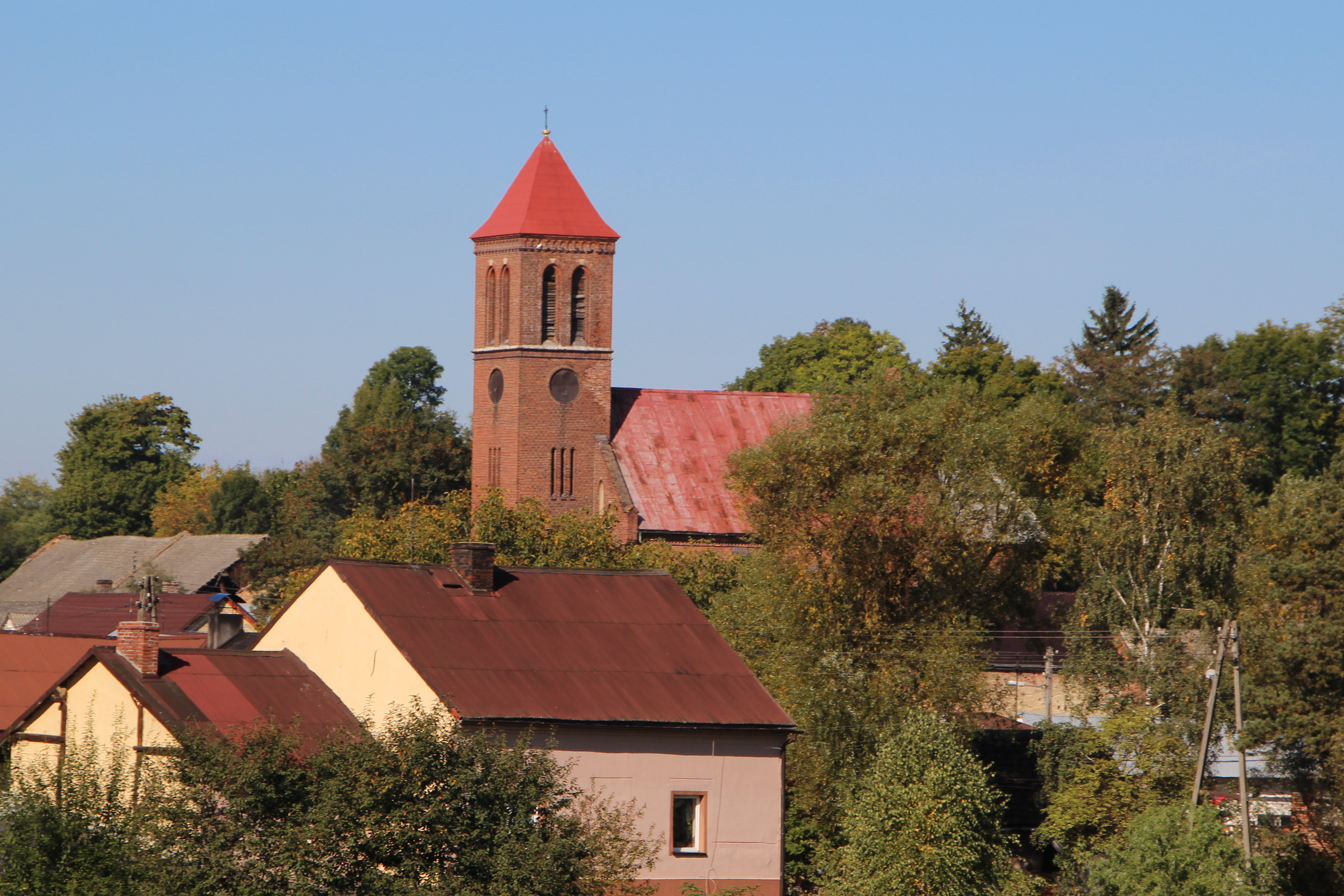 Czerwonków - rzymskokatolicki kościół parafialny p.w. Narodzenia NMP